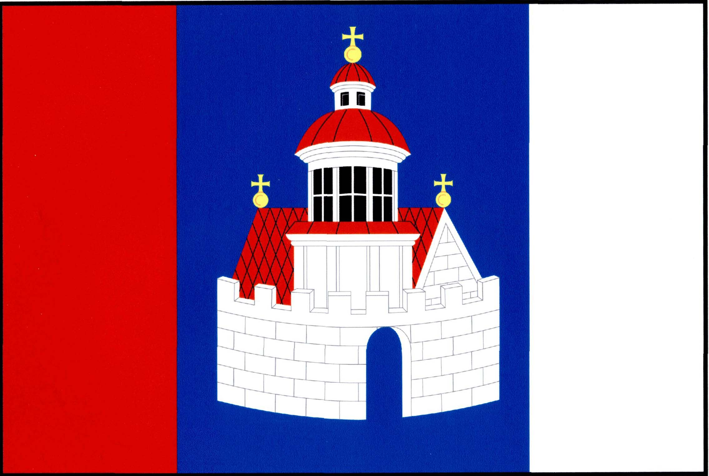 Vlajka města Bochov